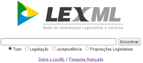 screem de